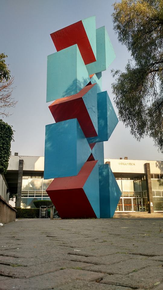 Las Torres de la FES Zaragoza, UNAM.